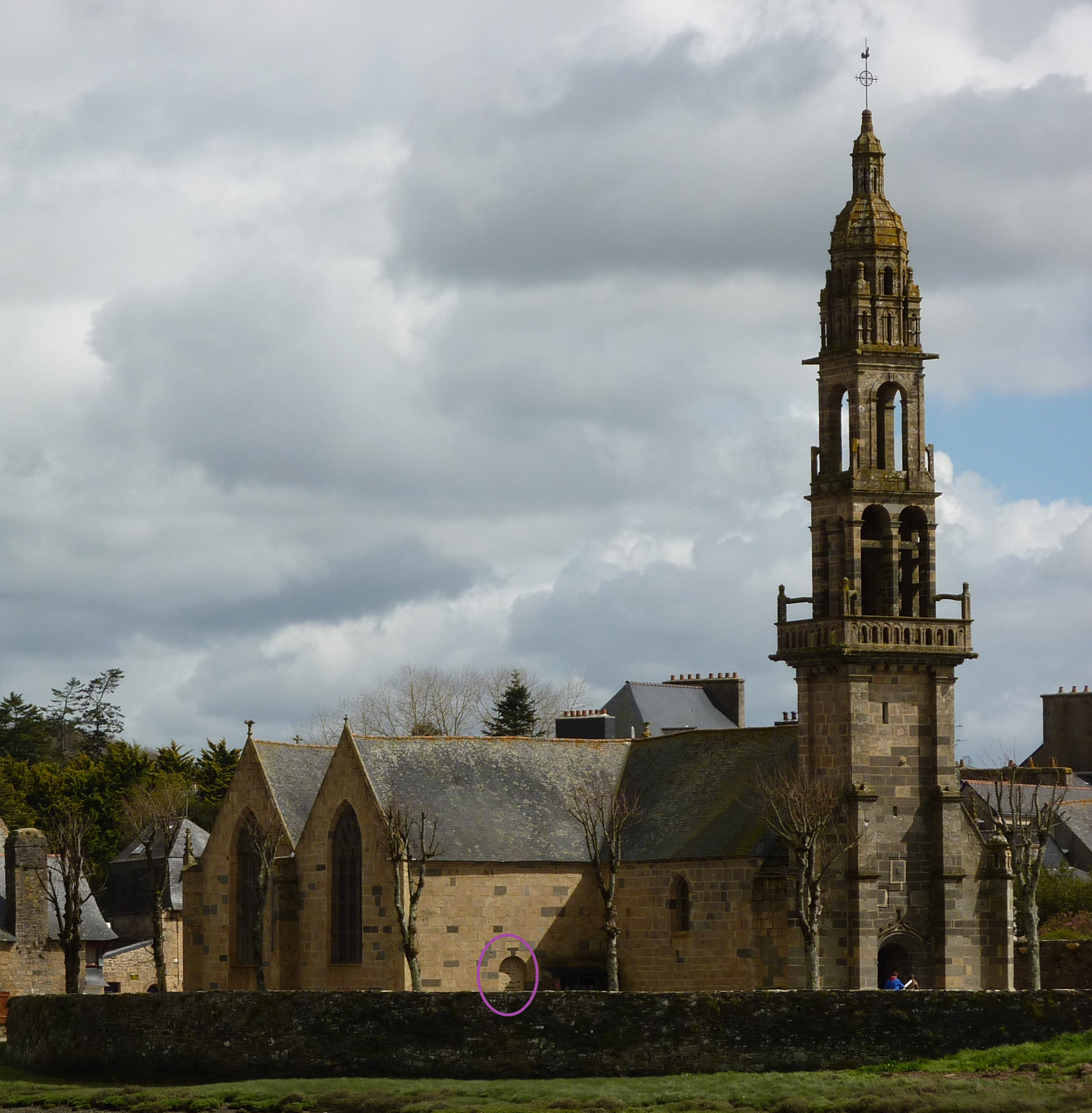 La porte de l'église du Faou, Bretagne, seule entrée autorisée à l'époque pour les caquins (cacous), a été condamnée à la fin du XIXe siècle.